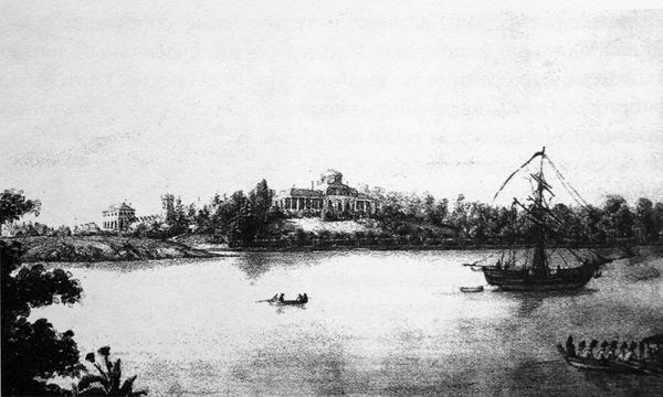 Murzinka Estate near St Petersburg